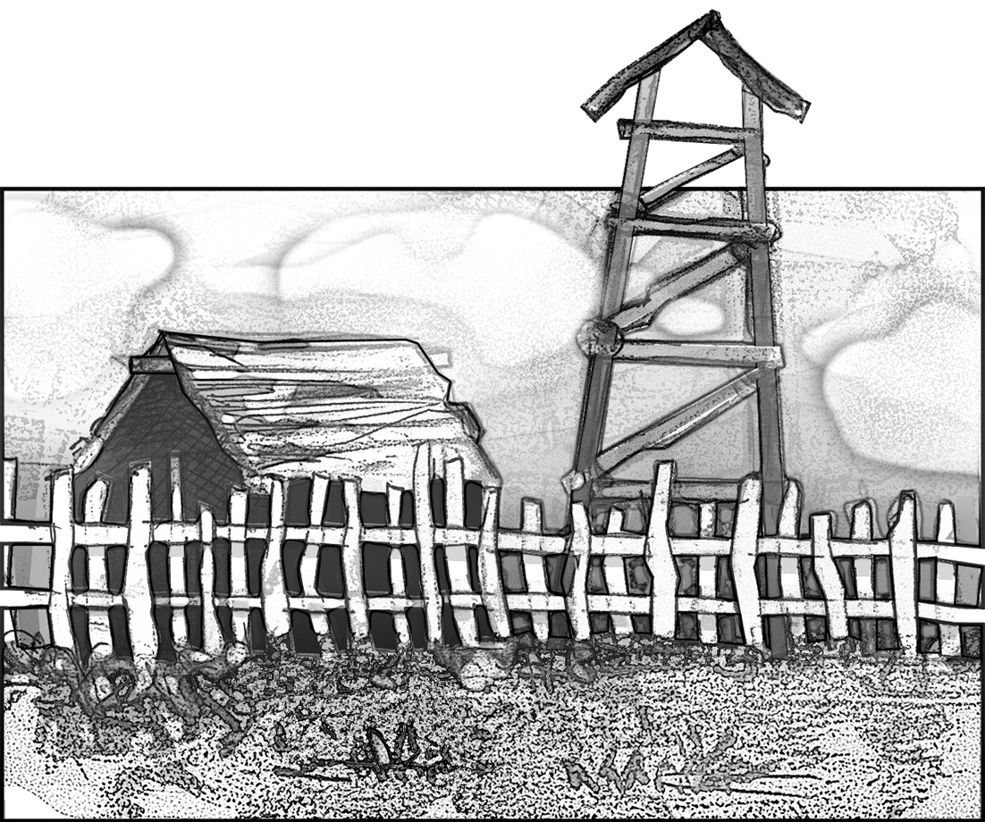 Testimonio gráfico de los fuertes de frontera, que breve permanencia en cada lugar (trasladados continuamente)